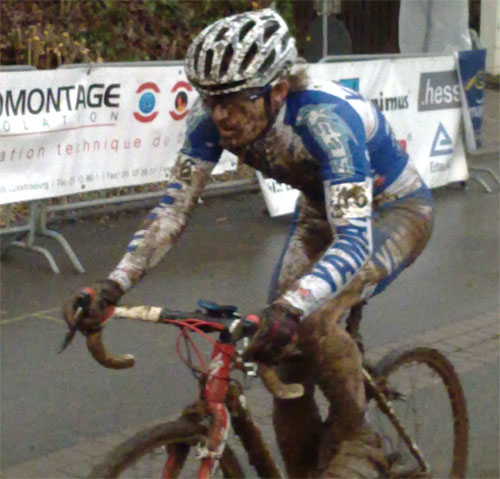 De Christian Helmig, am Cyclo-Cross Championnat zu Keel.